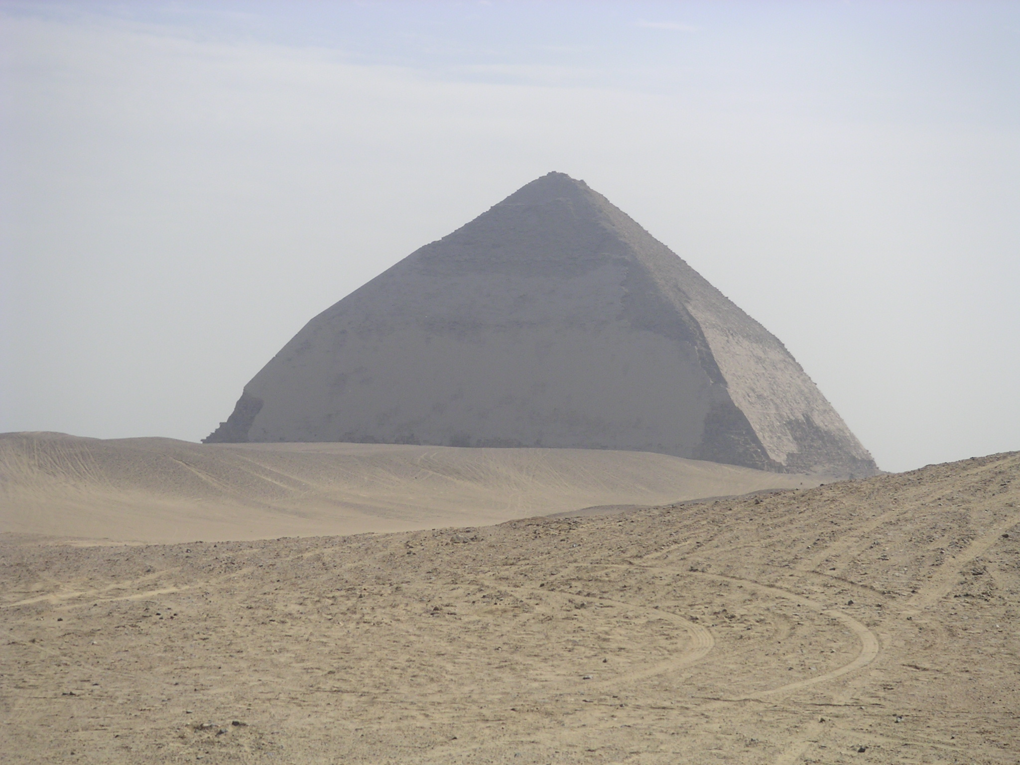 Vue de la pyramide dite "rhomboïdale" de Daschour - Règne de Snéfrou - IVe dynastie égyptienne